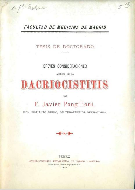 Medico Jerezano